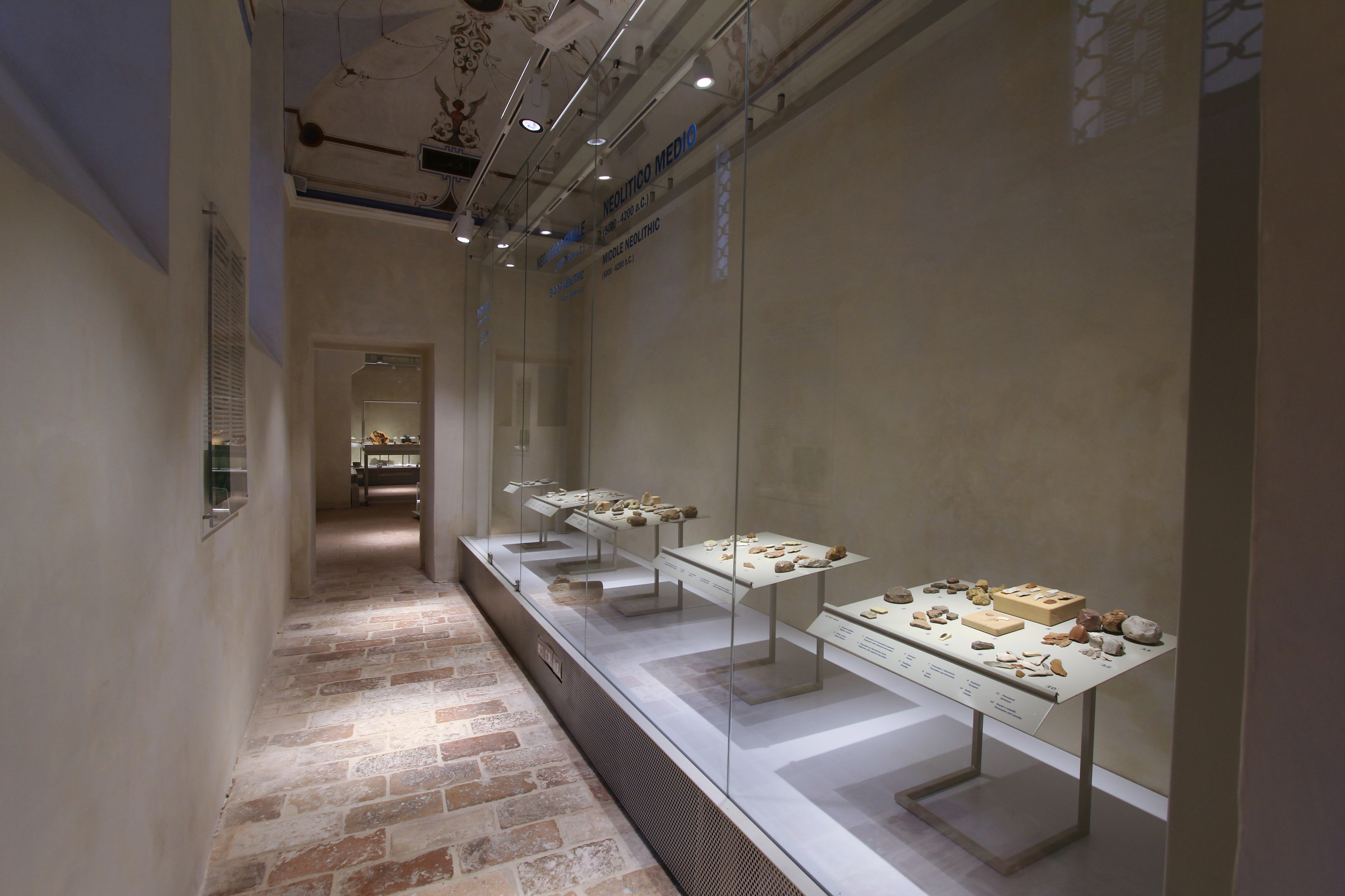 La fotografia riprende di scorcio il secondo corridoio del Museo